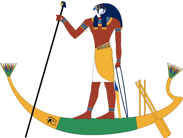 Na mitologia egípcia , Nemty (Antaeus em grego) era um deus cuja adoração se centrava em Antaeopolis, na parte norte do Alto Egito.